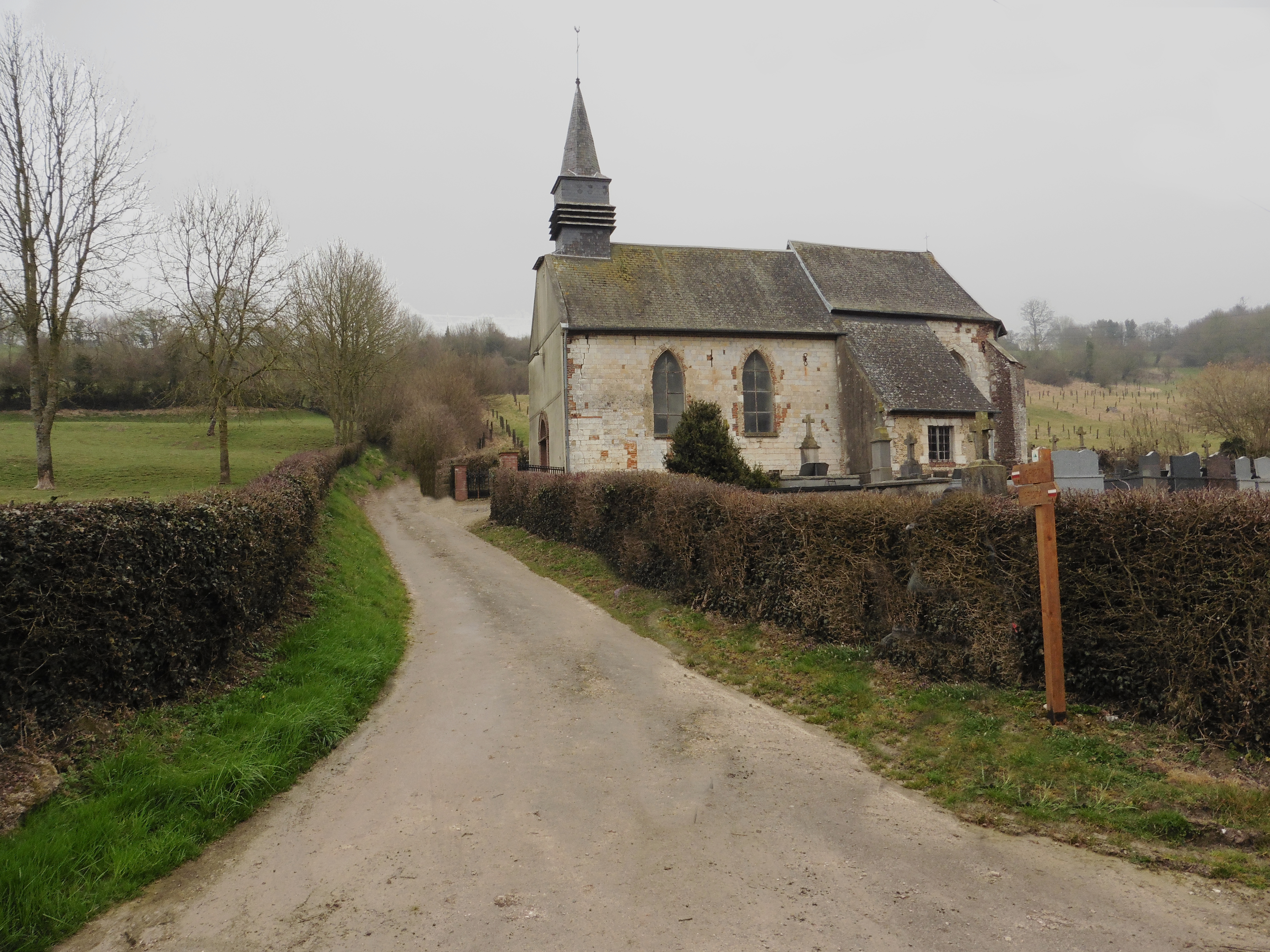 L'église Saint-Pierre de Bimont, sur le GR 127 Pas-de-Calais.- ( Pas-Calés).- France.